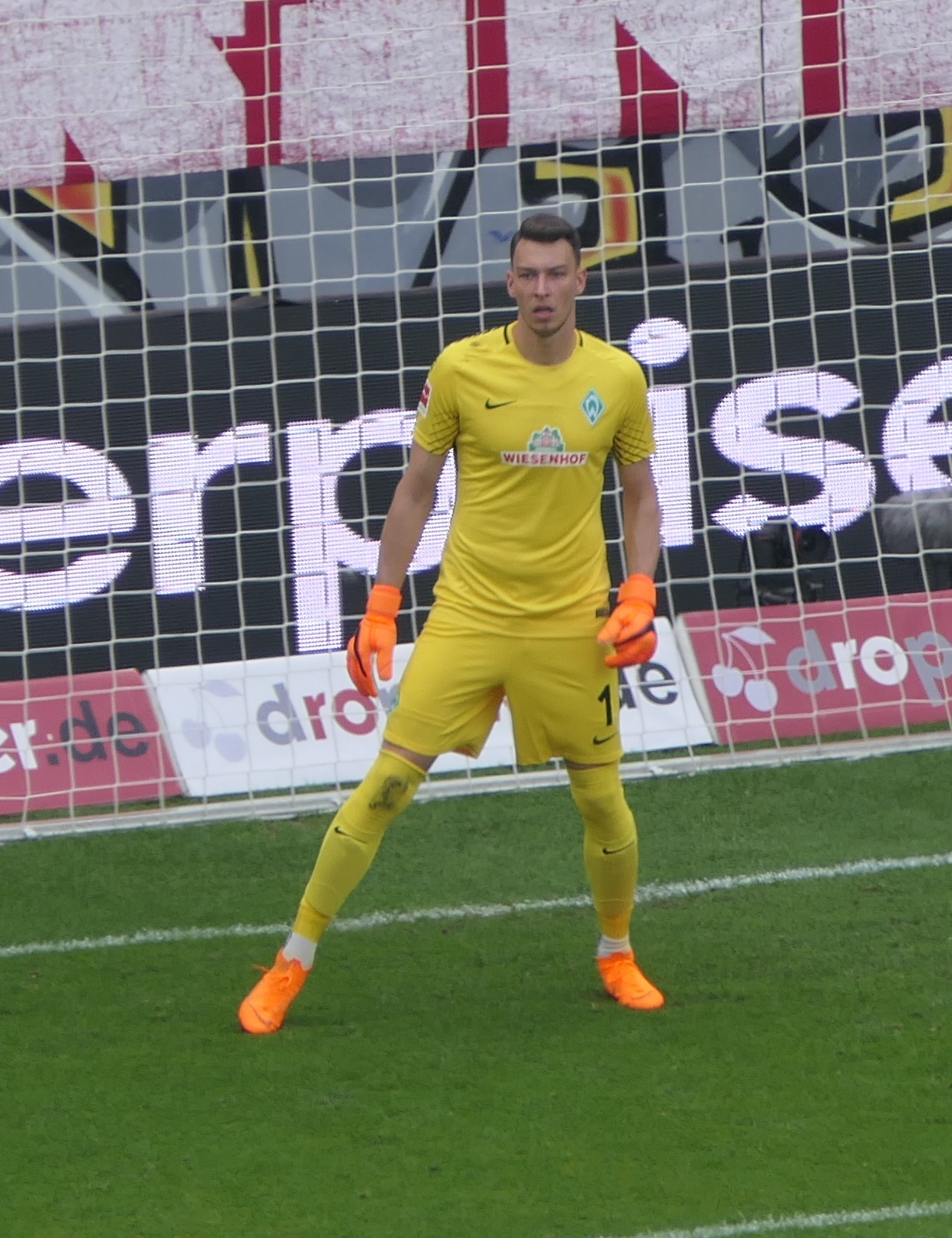 Der Fussballprofi Jiri Pavlenka im Trikot vom SV Werder Bremen beim Auswärtsspiel gegen den FSV Mainz 05 am 12.05.2018.